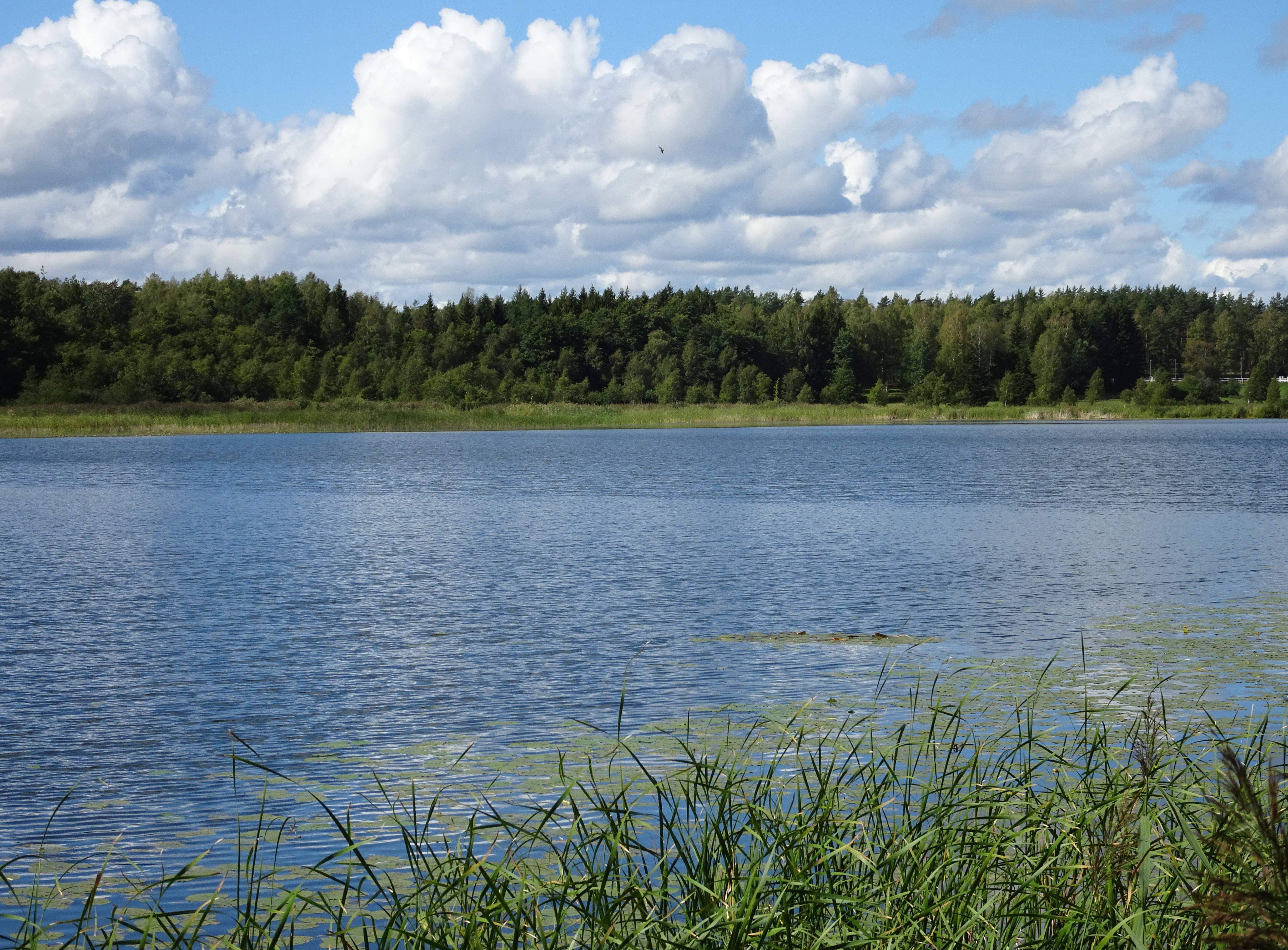 Örnässjön i Upplands-Bro